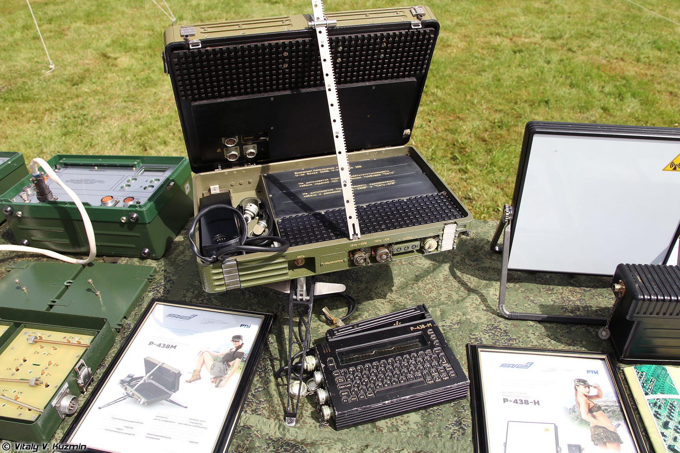 Абонентская носимая радиостанция Р-438М (R-438M radio)